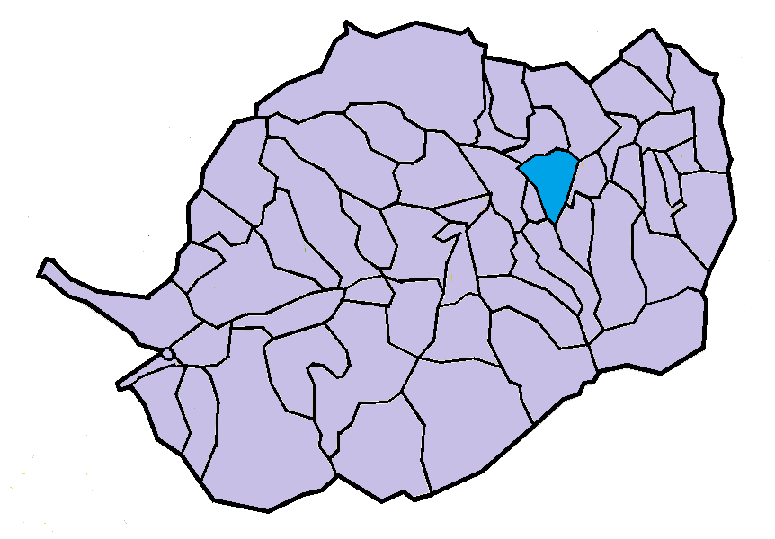 Prada en el Conflent, a partir del mapa municipal del Conflent de lliure disposició adaptat al Nomenclàtor toponímic aprovat el 2007